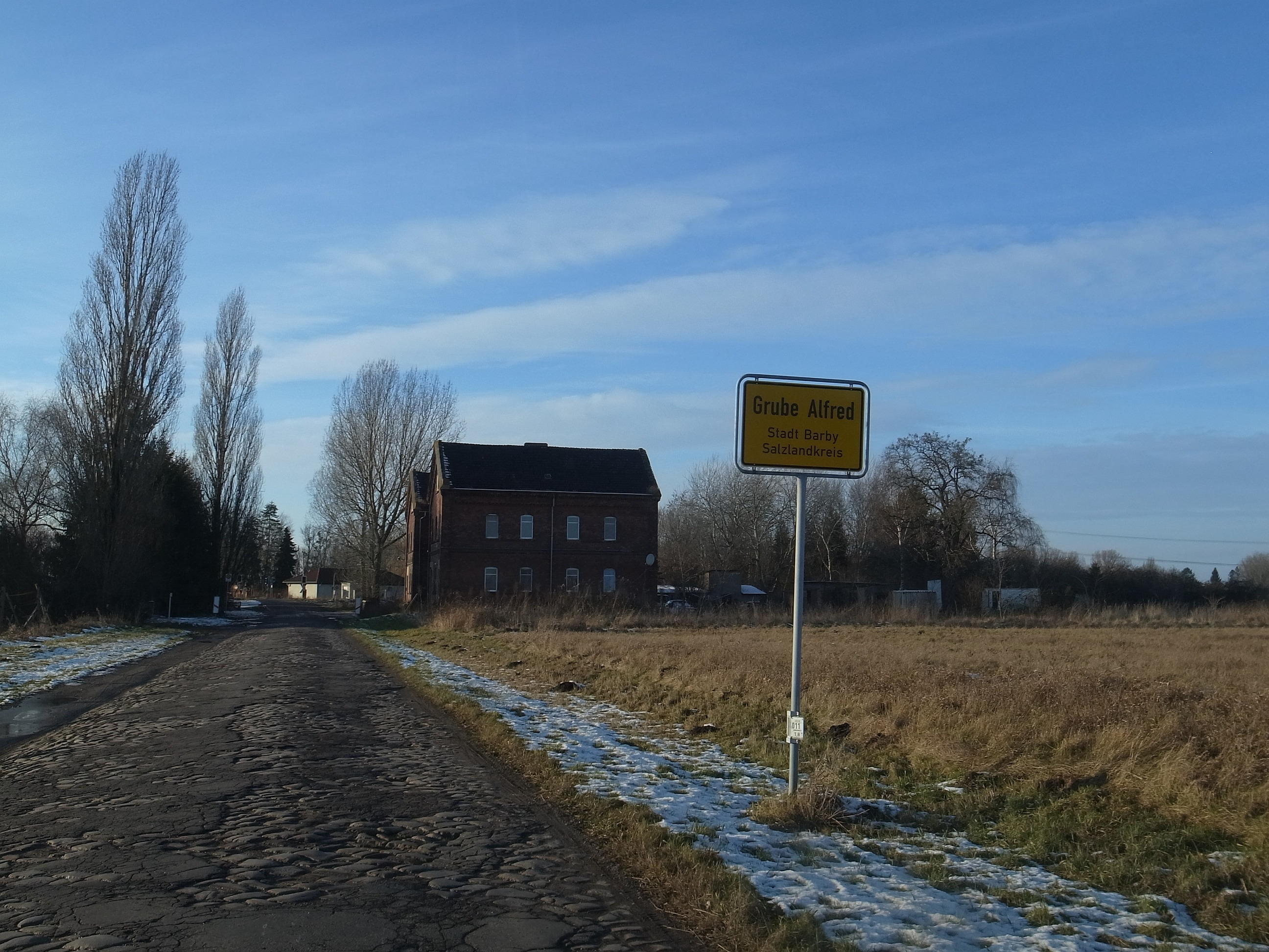 Grube Alfred, Stadt Barby, Salzlandkreis, Ortseingangsschild